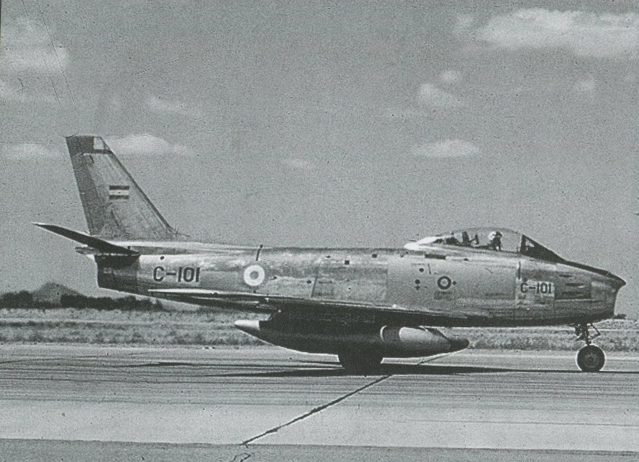 El 16 de diciembre de 1960, en el marco de la presentación oficial del NA F-86 Sabre en el Aeropuerto Internacional de Ezeiza, ante el presidente de la Nación doctor Arturo Frondizi y las máximas autoridades de la Fuerza Aérea, el vicecomodoro Eduardo Correa Arce pilotando el Sabre C-101 perteneciente al Grupo 1 de Caza Bombardeo con asiento en la IV Brigada Aérea, efectúa el primer pasaje de la barrera del sonido en el país.